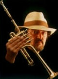 Edward H. Tarr mit Tarr-Model hoch-B-Trompete von Yamaha.